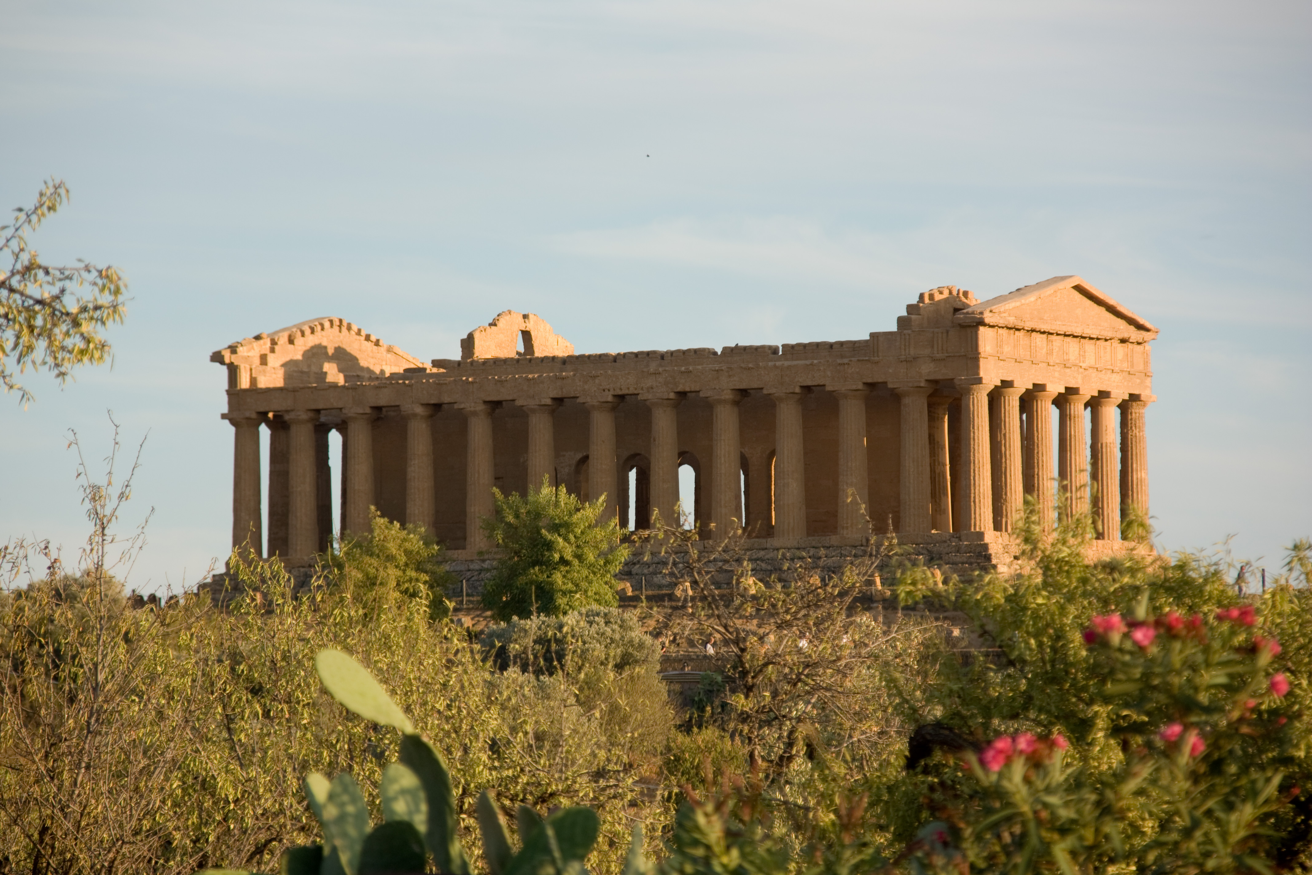 Tempio della Concorda (temple de de la Concorde) , Sicile, Italie